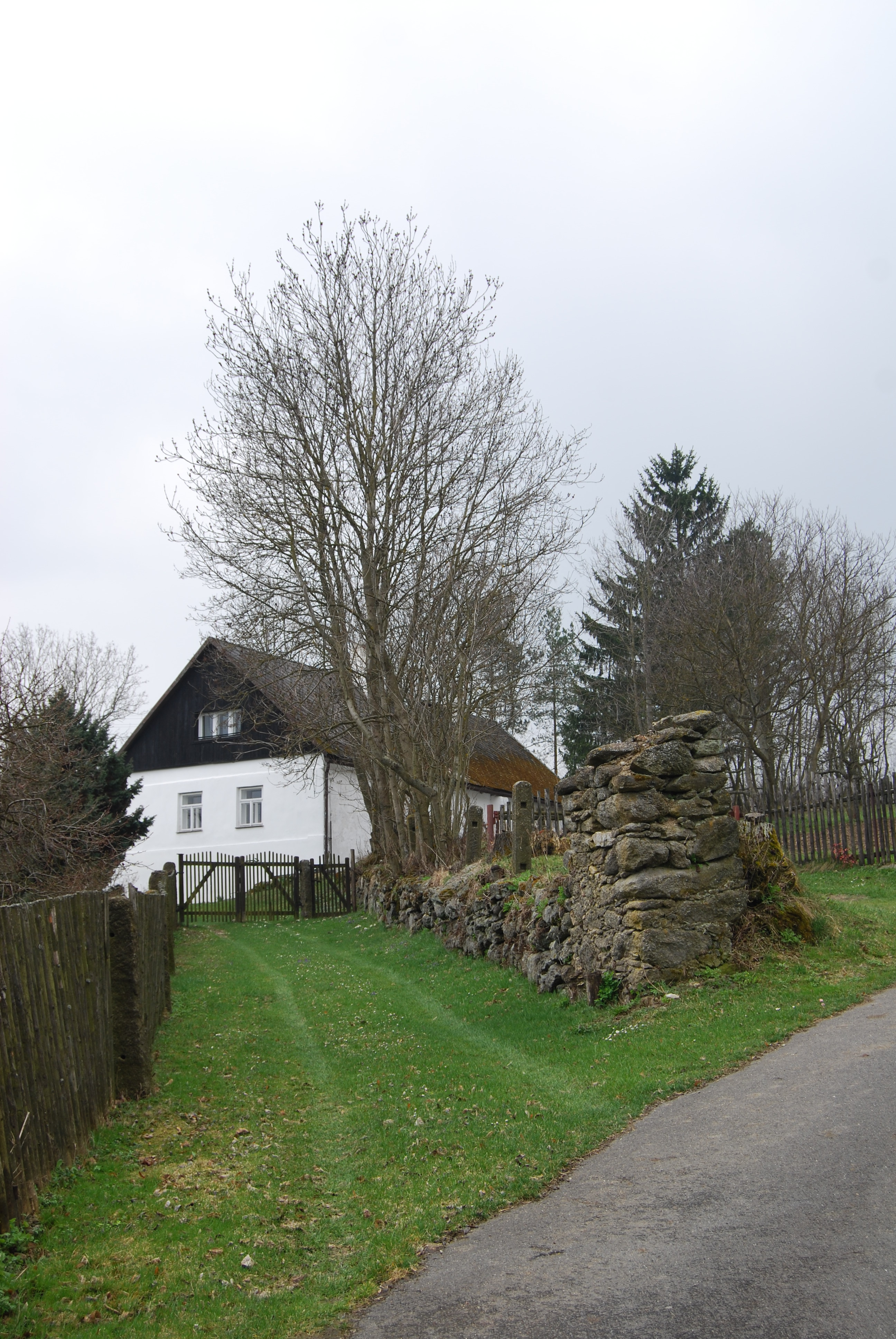 Pohled na část obce. Kvašťov je malá vesnice, část obce Chyšky v okrese Písek. Česká republika.